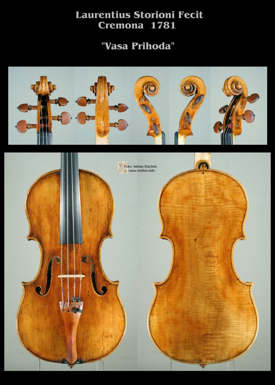 Violine von Vasa Prihoda "Laurentius Storioni"